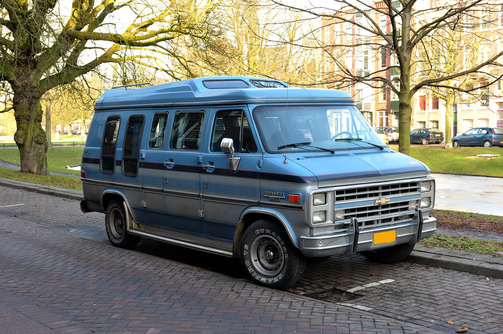 Chevrolet (1985)